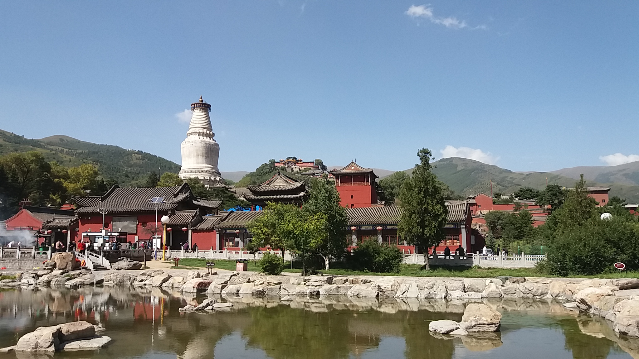 五台山塔院寺